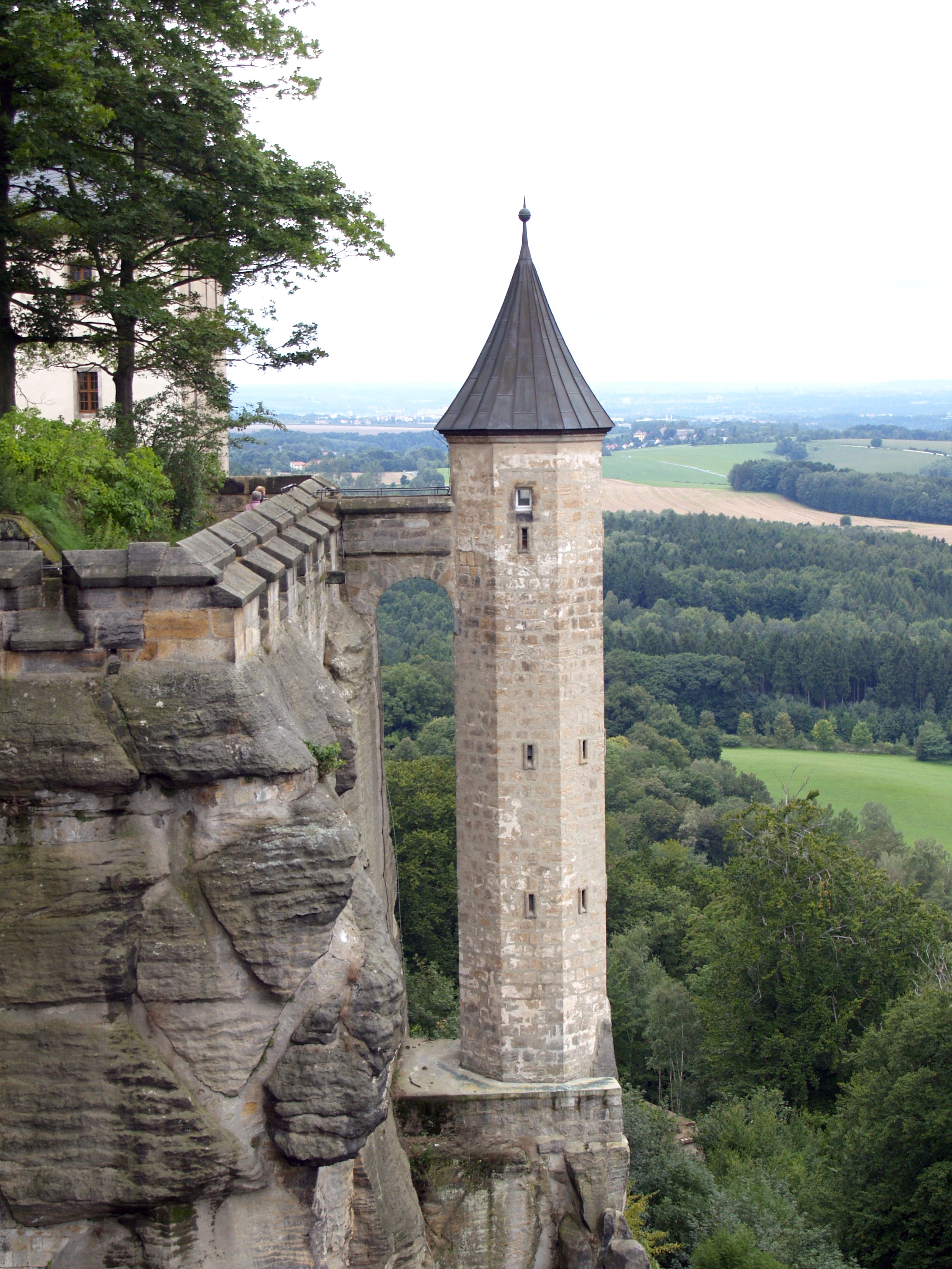 FestungKönigstein-Hungerturm